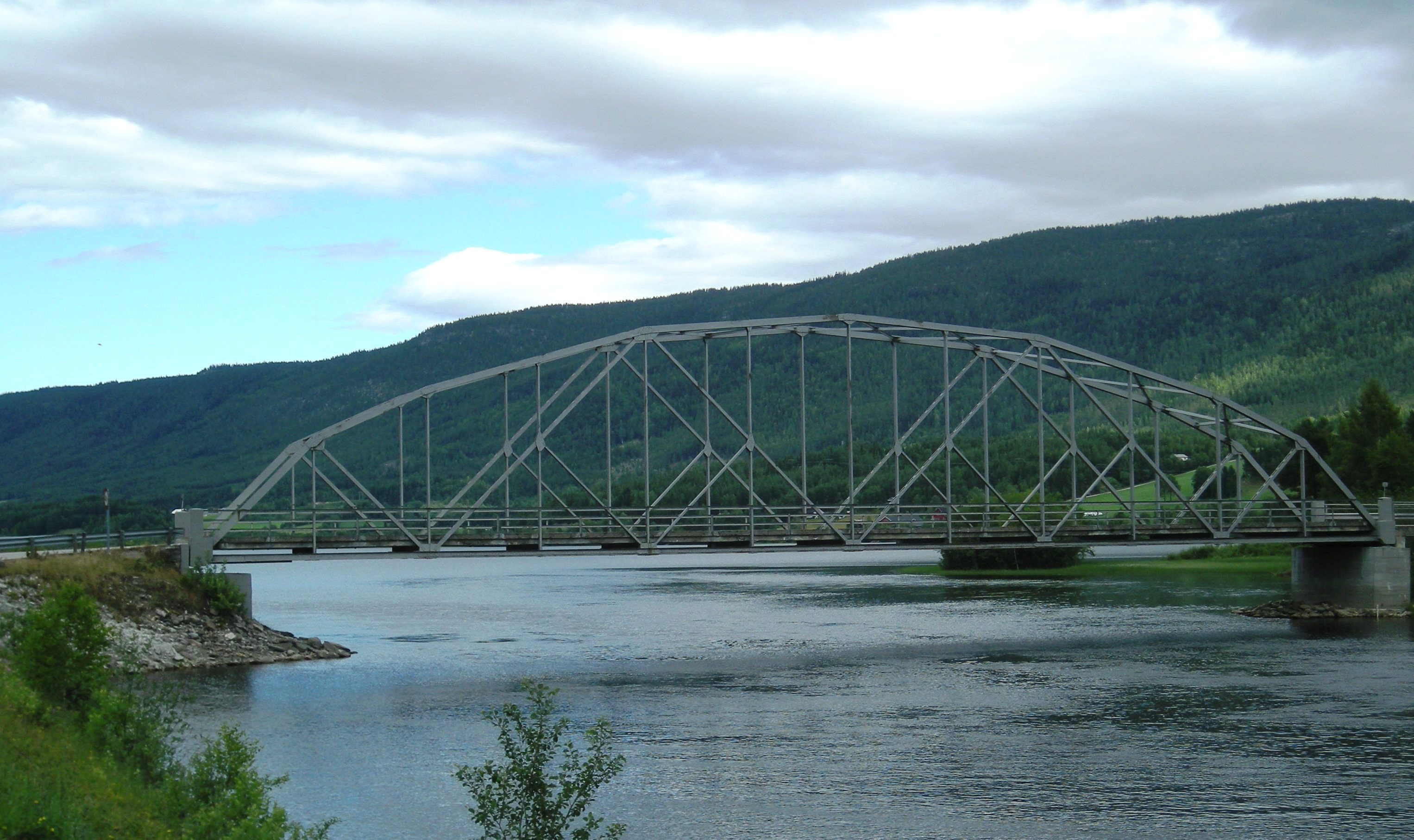 Kvernnesodden bru i Rendalen